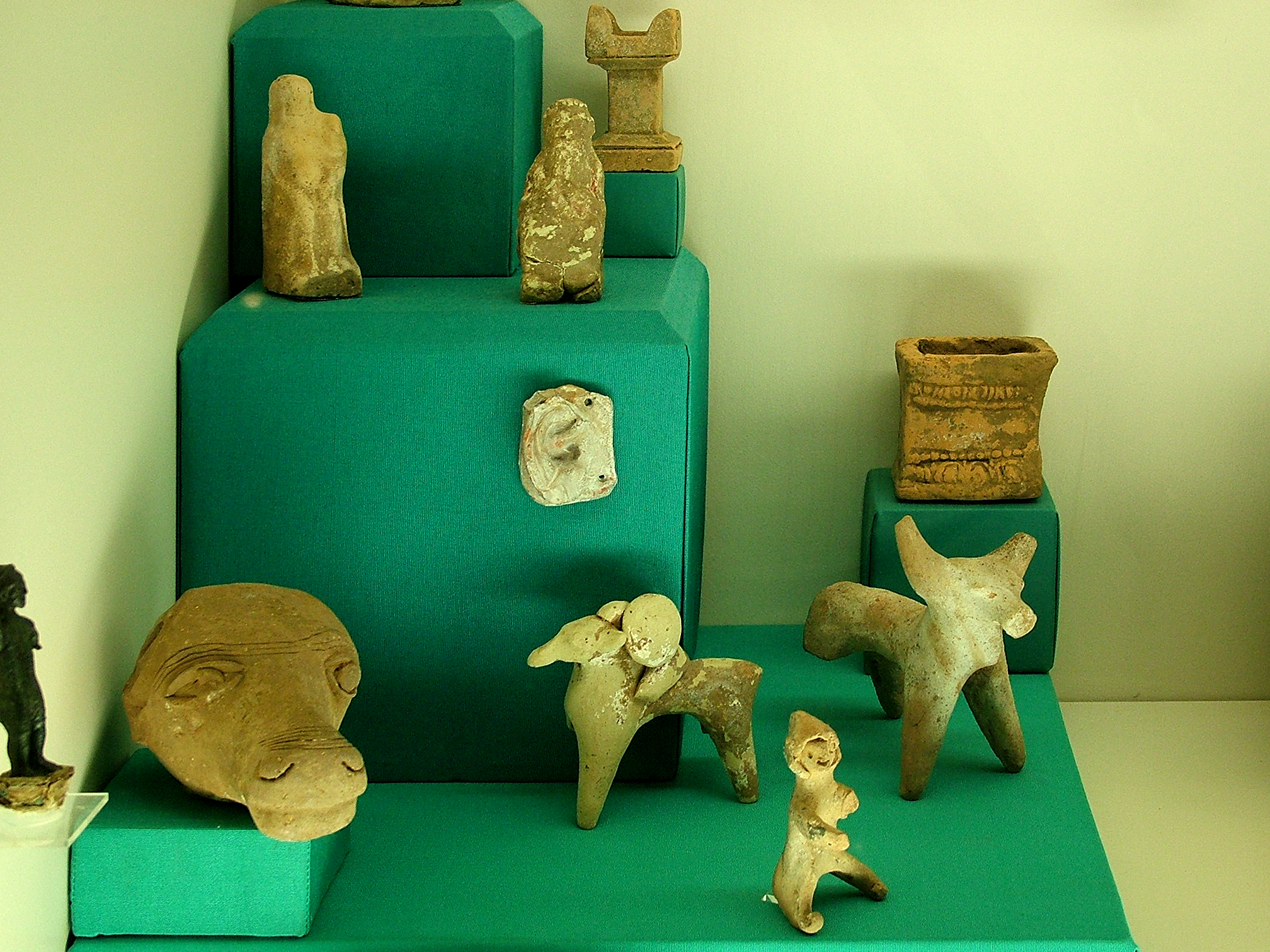 Antalya, Törökország: Régészeti Múzeum